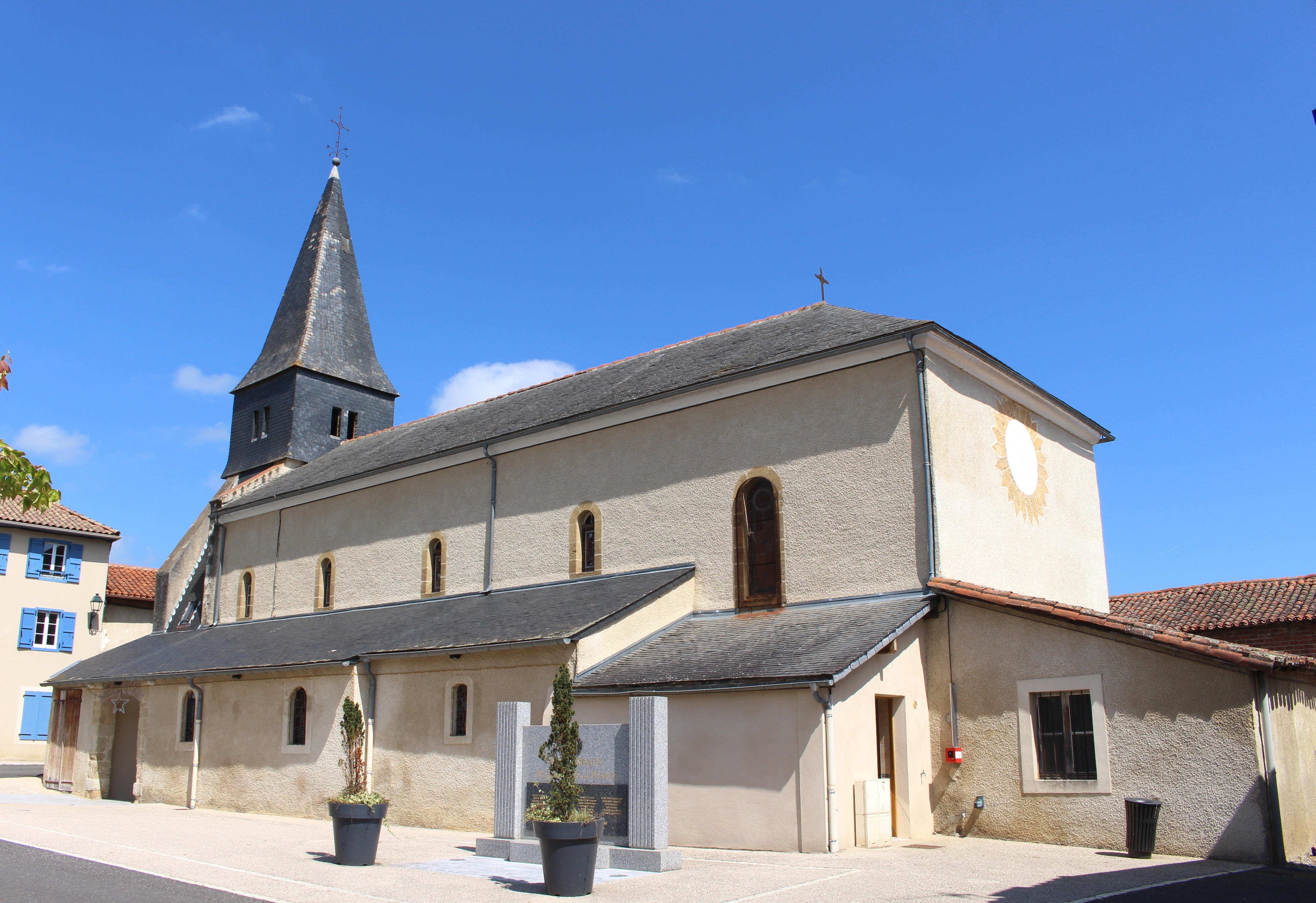 Église Saint-Félix de Bonnefont (Hautes-Pyrénées)